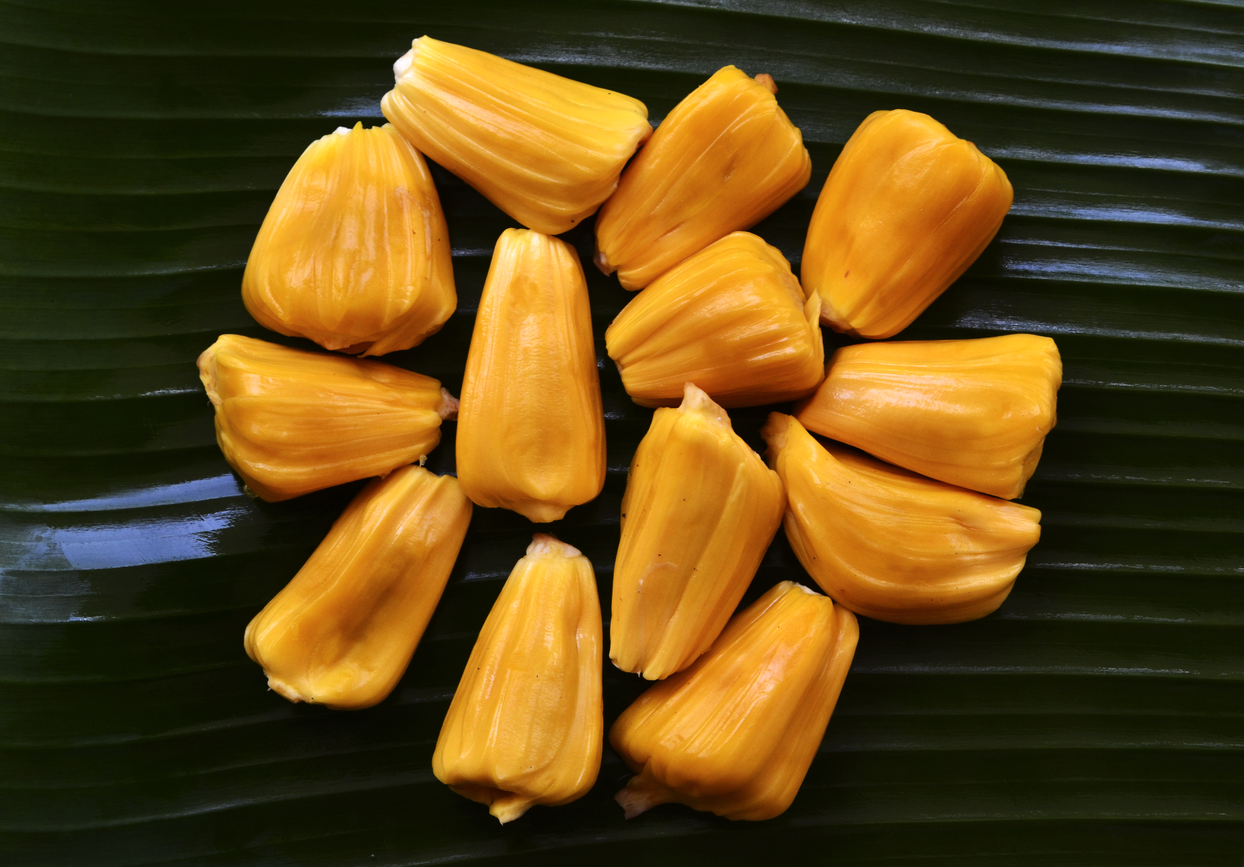 പഴുത്ത ചക്കച്ചുള